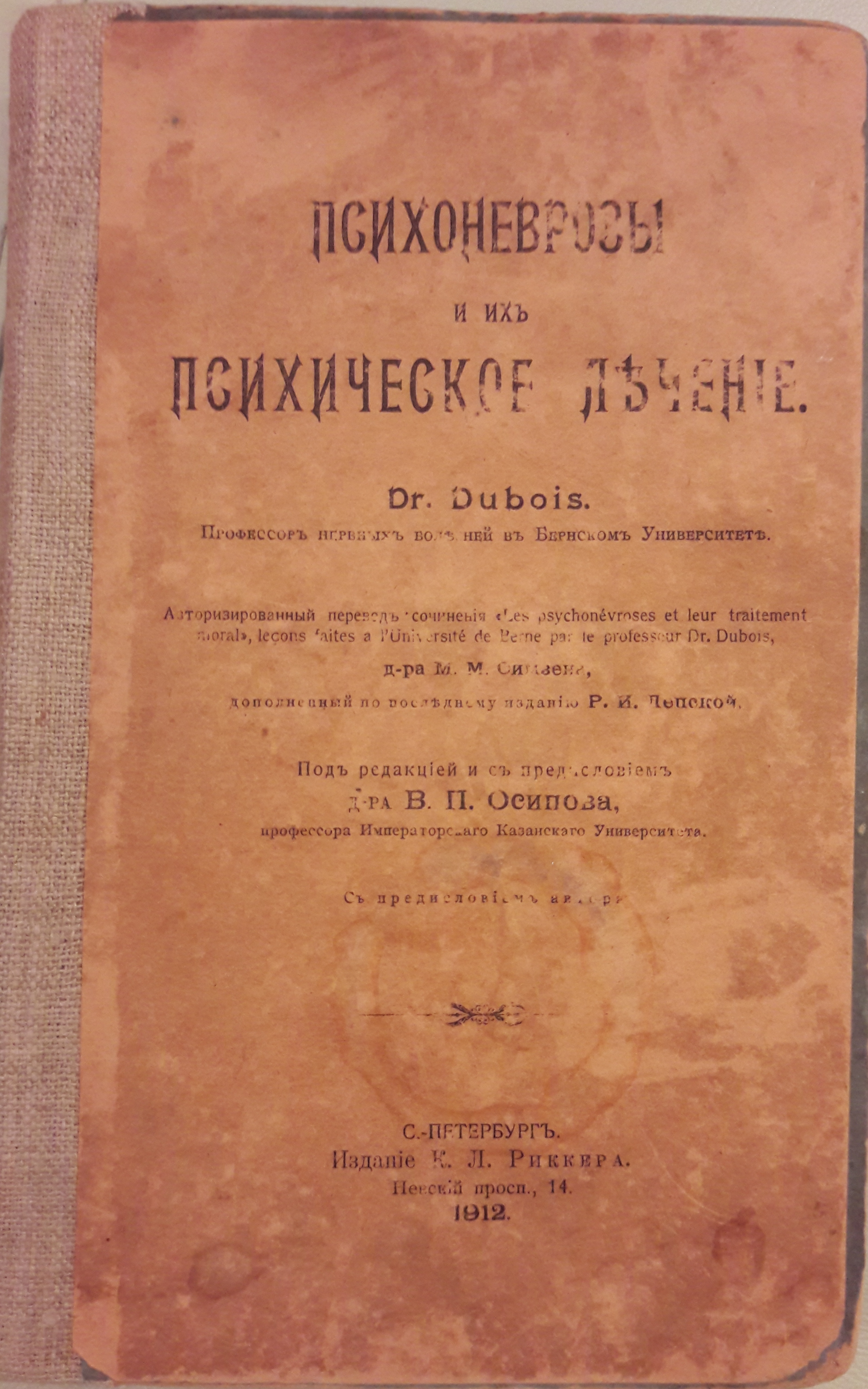 Дюбуа, Поль (1848-1918). Психоневрозы и их психическое лечение / Dr. Dubois, проф. нервных болезней в Берн. ун-те.; !Авториз. пер. соч. "Les psychonèvroses et leur traitement moral", leçons faites à l'Université de Berne par le professeur dr. Dubois д-ра М.М. Симзена, доп. по послед. изд. Р.И. Лепской; Под ред. и с предисл. д-ра В.П. Осипова, проф. Казан. ун-та; С предисл. авт. - Санкт-Петербург : К.Л. Риккер, 1912. - XVIII, 397 с.